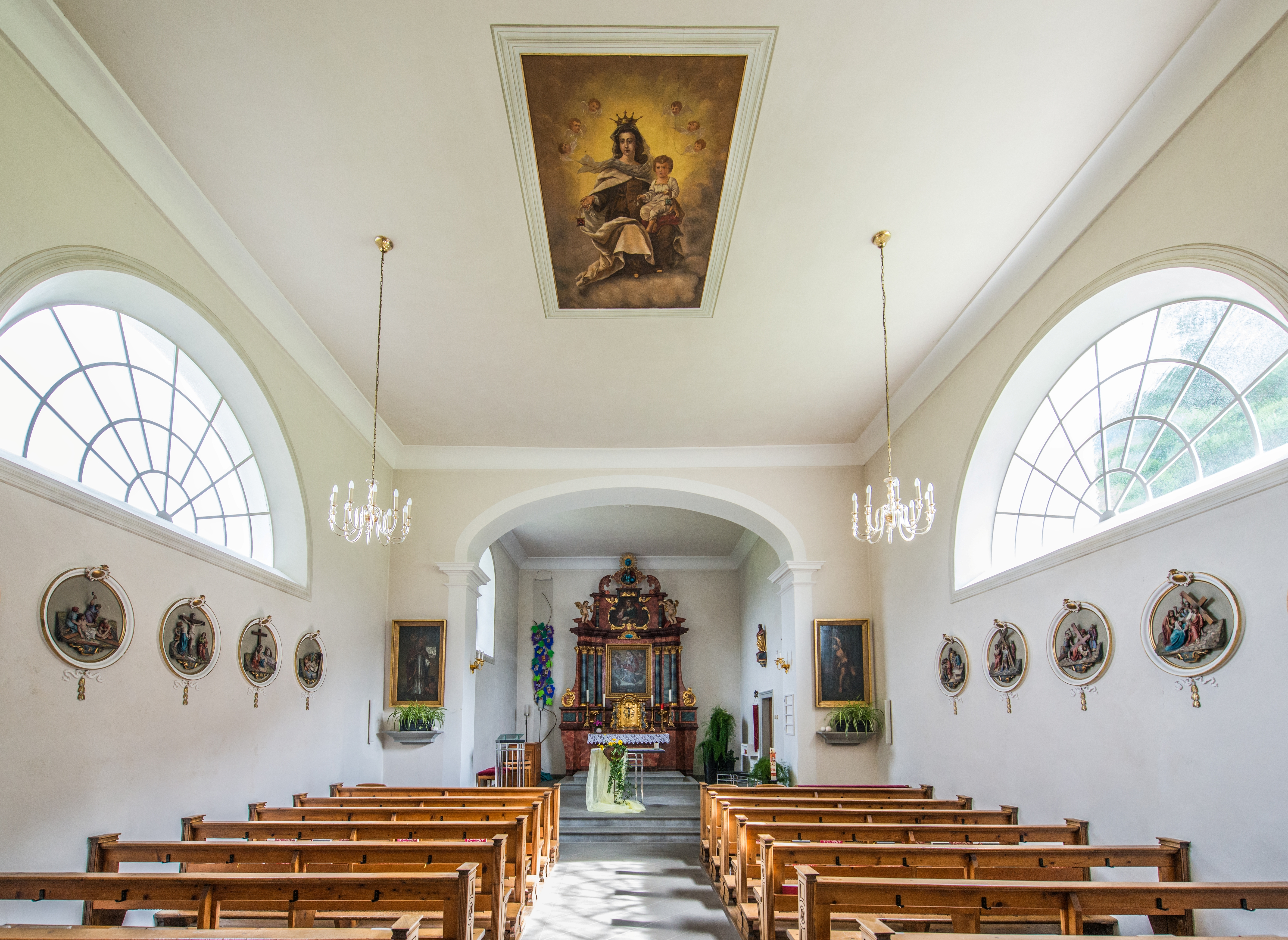 Kapelle Mariahilf/Maria Heimsuchung auf Maria Ebene in Fellengatter, Frastanz. Erbaut 1826. Im Giebelaufsatz des Hochaltares ist eine Figur Gottvater von Erasmus Kern um 1640.